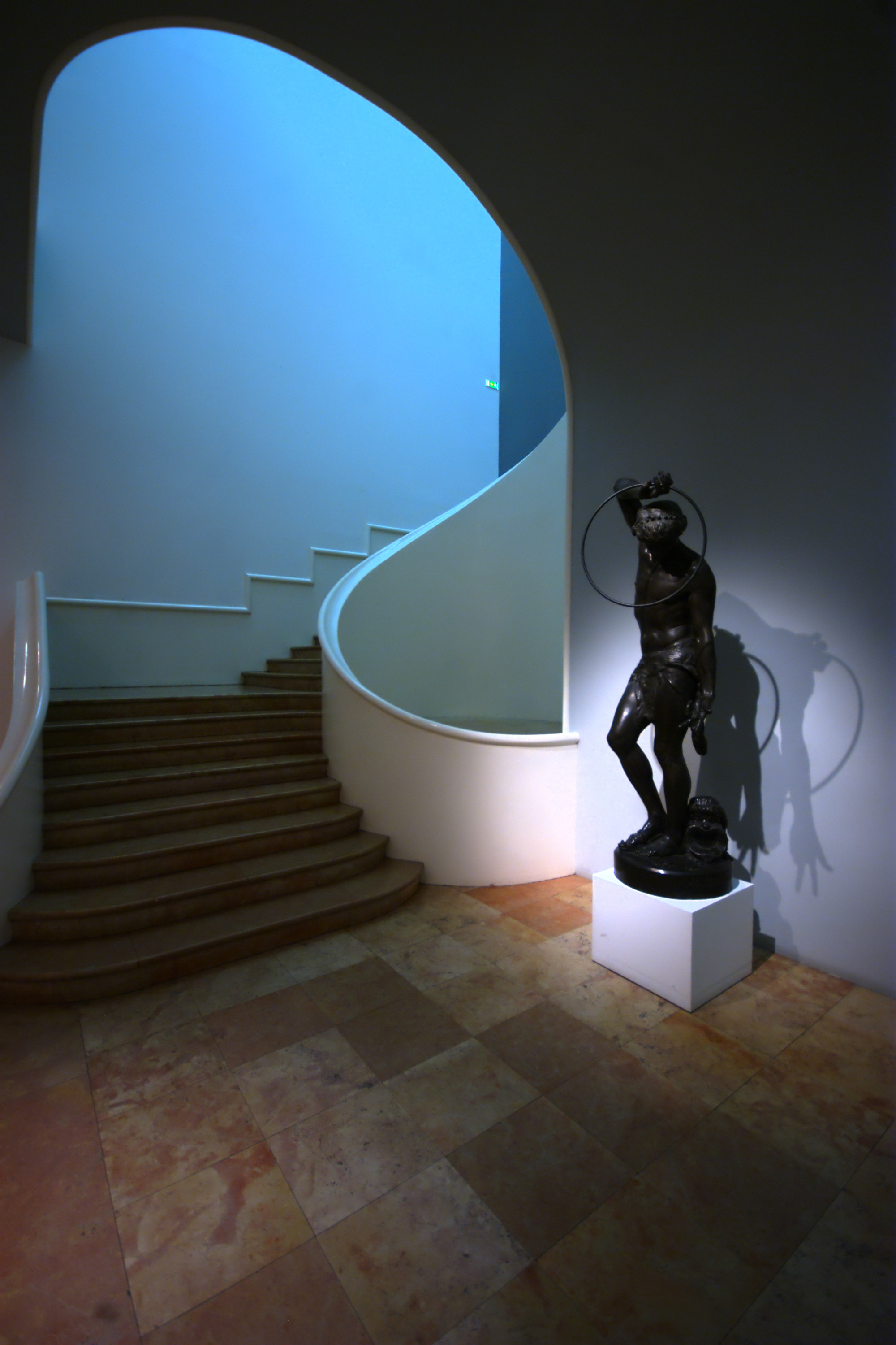 "Histrion" (1860), œuvre de Gorges-Prosper Clere, artiste nancéien né en 1829, décédé en 1901. Collection musée des Beaux-Arts de Nancy (mban). L'escalier qui abrite l'œuvre est dû à Jacques (1904-1985) et Michel (1905-1975) André.